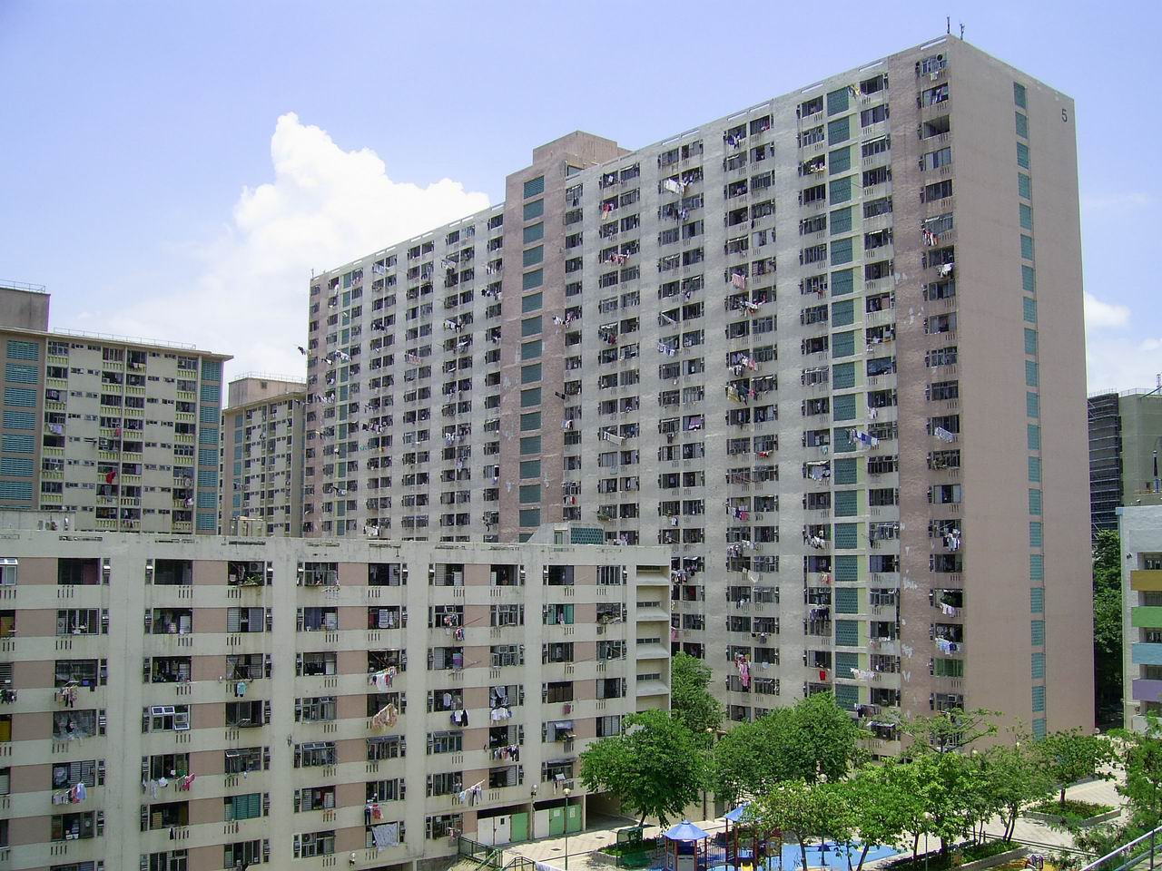 中文（香港）: 梨木樹(二)邨